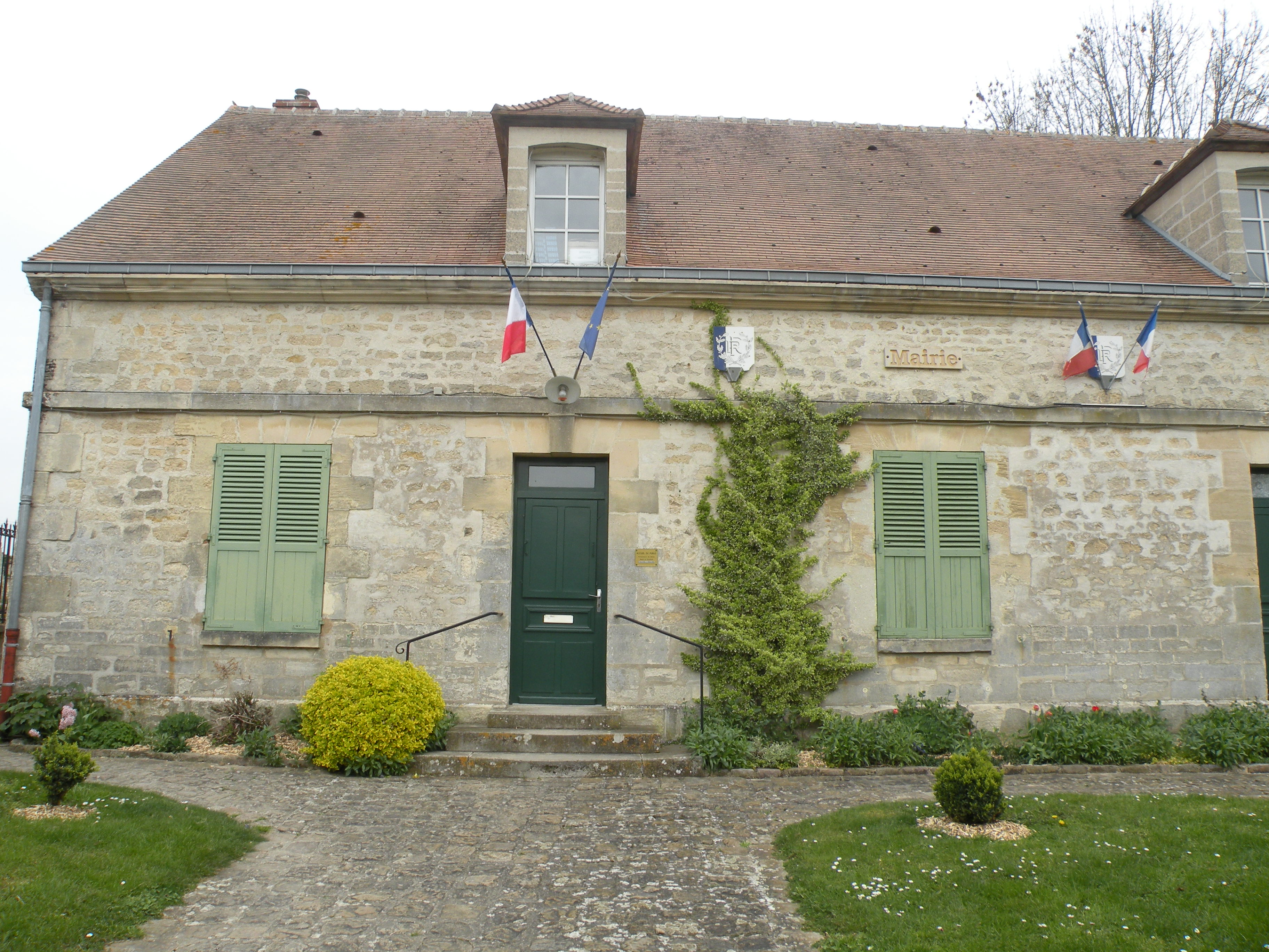 Morangles mairie